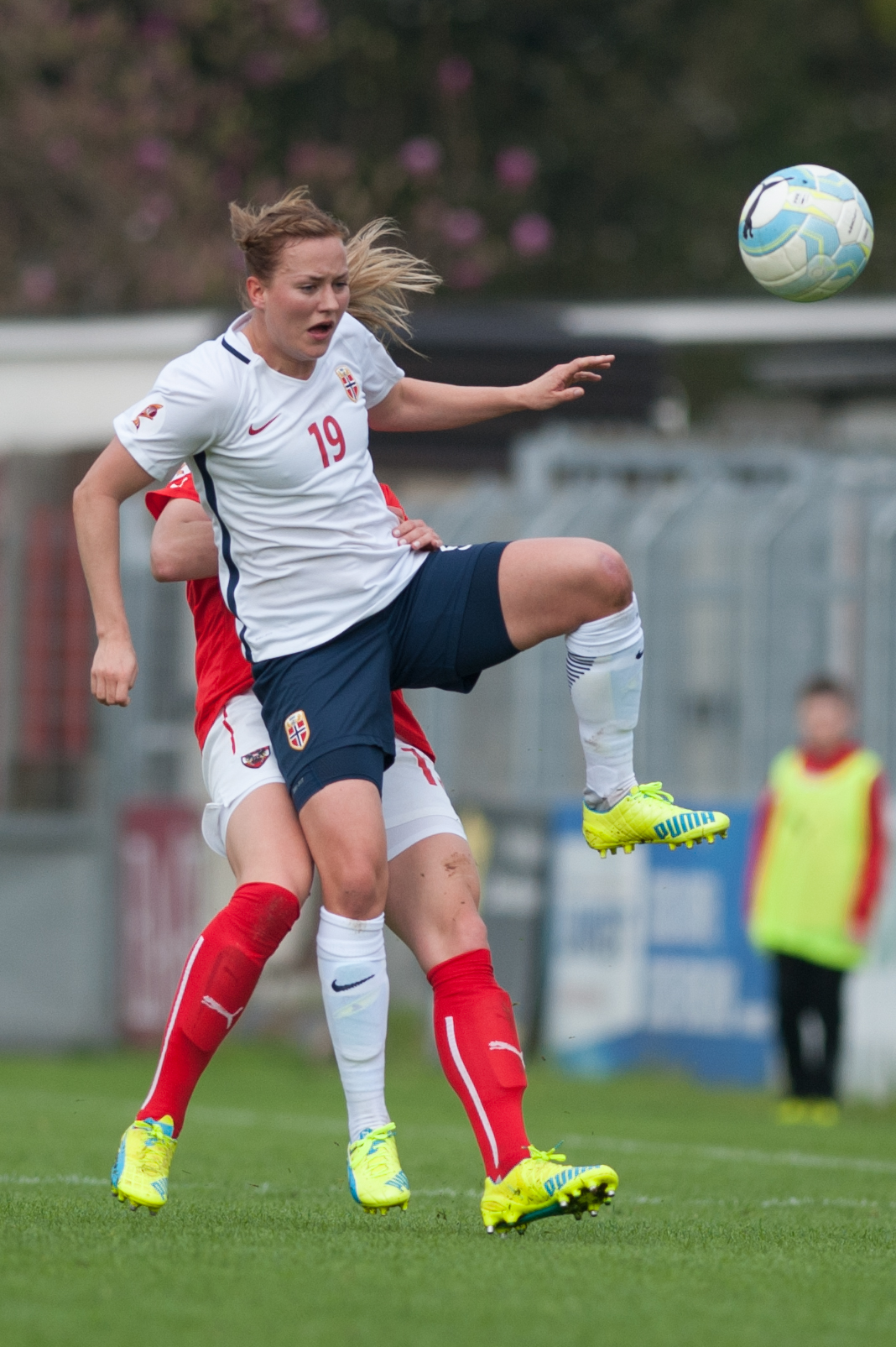 Steyr, Austria, 10.04.2016, ÖFB Frauen EM-Qualifikation - Österreich vs Norwegen. Bild zeigt Kristine Minde (NOR).